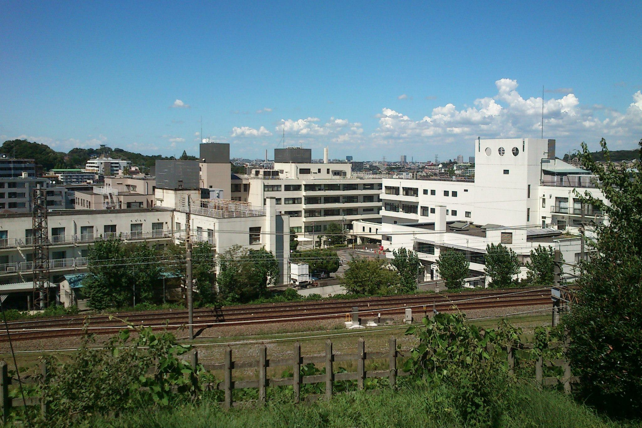 日医大多摩永山病院